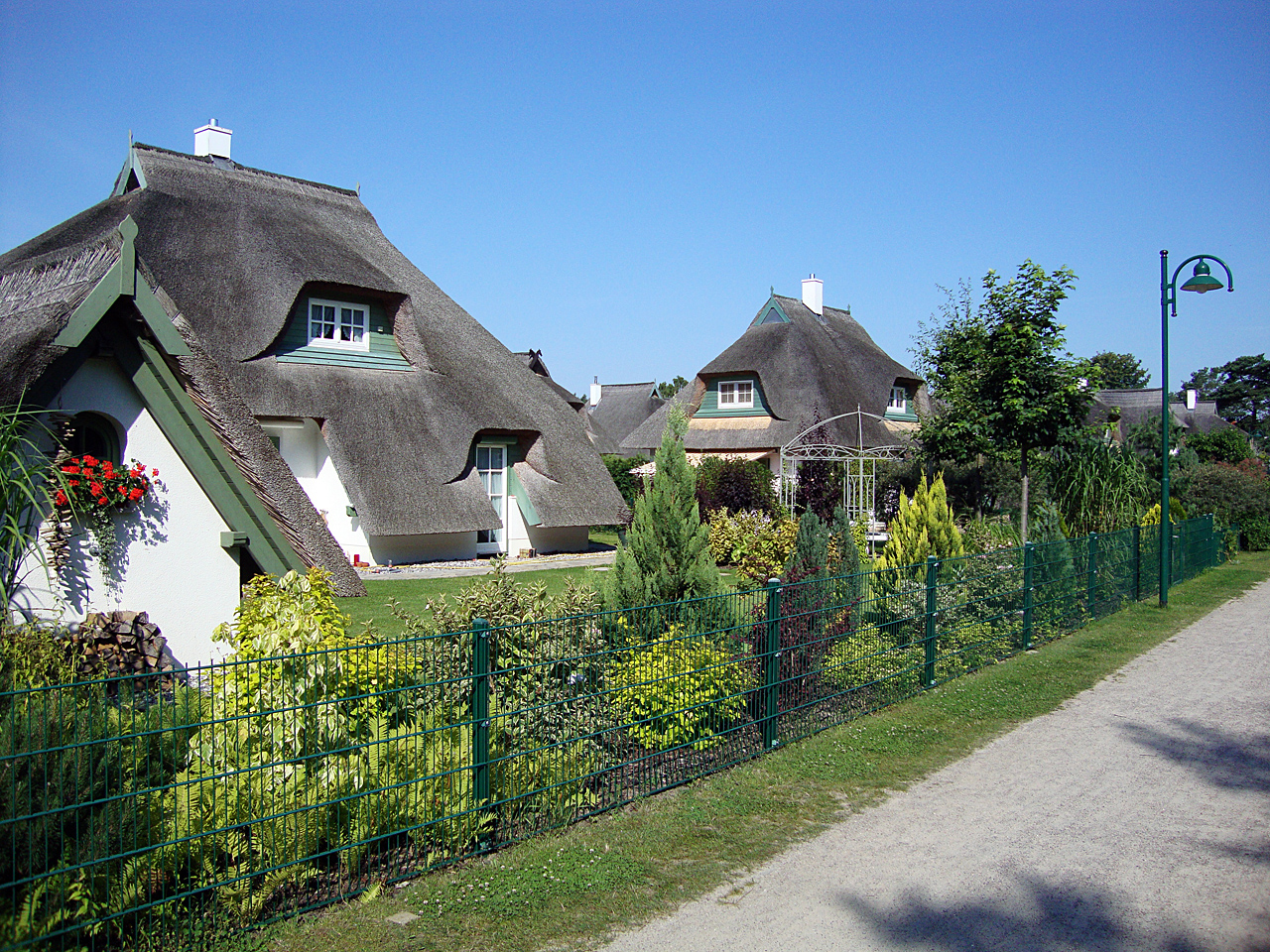 Karlshagen, Ferienhäuser in der Dünenresidenz, 2009